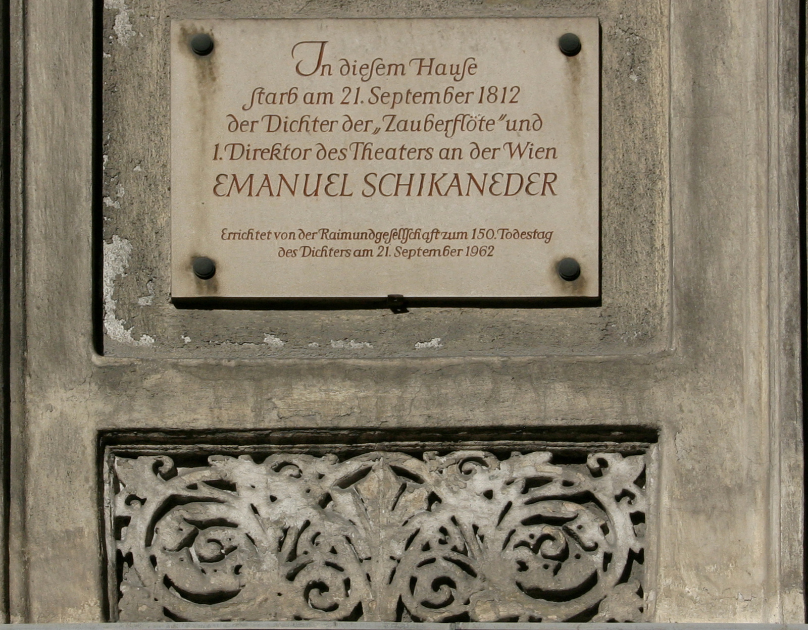 Josefstadt in Wien